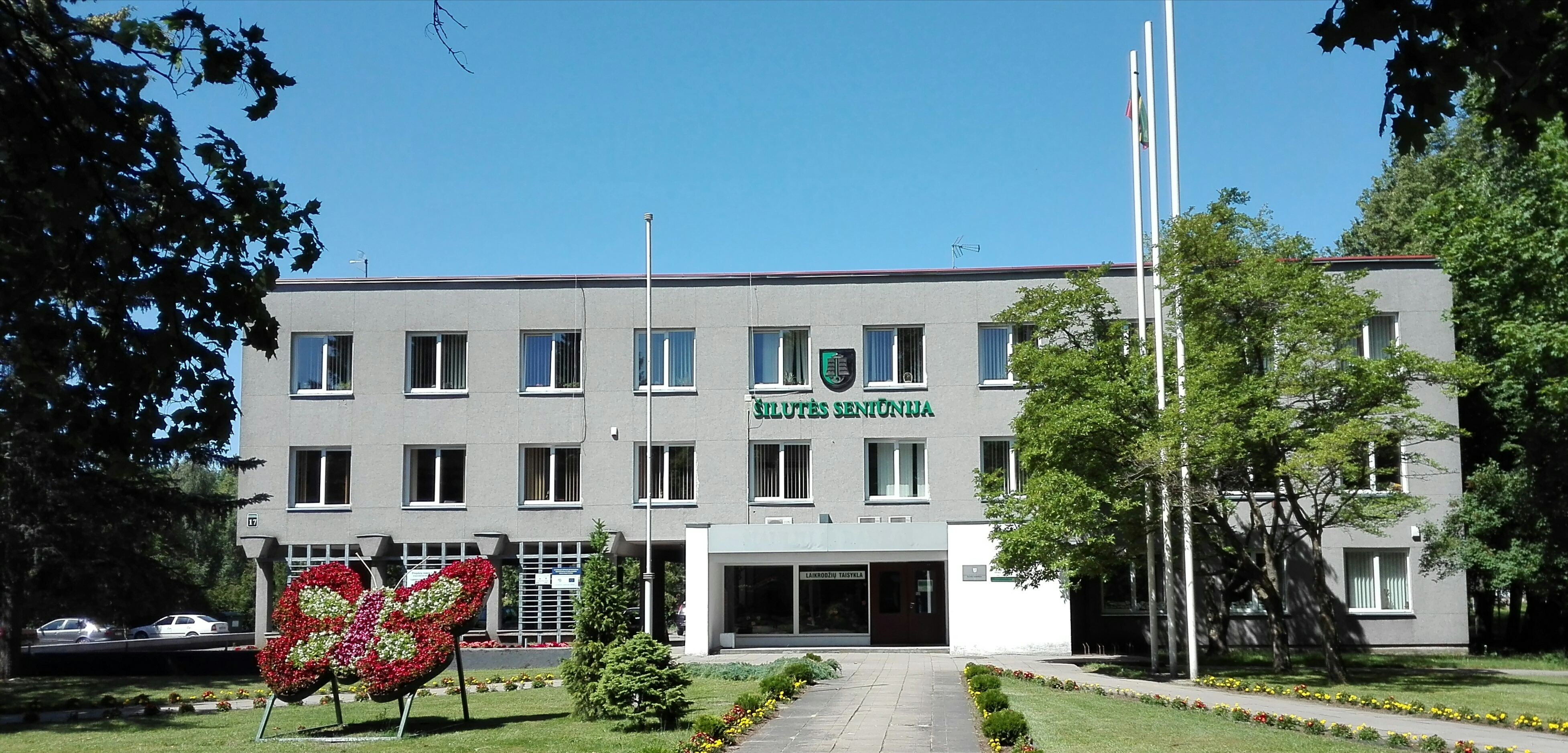 Šilutės seniūnijos pastatas